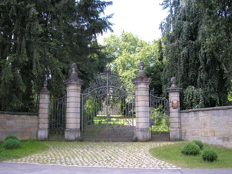 Schloss Untermerzbach (Landkreis Haßberge, Unterfranken) / Untermerzbach Castle, Lower Franconia, Germany. Gartenportal / Entrance to the park. Eigene Aufnahme, Juni 2006 / Own photo, June 2006